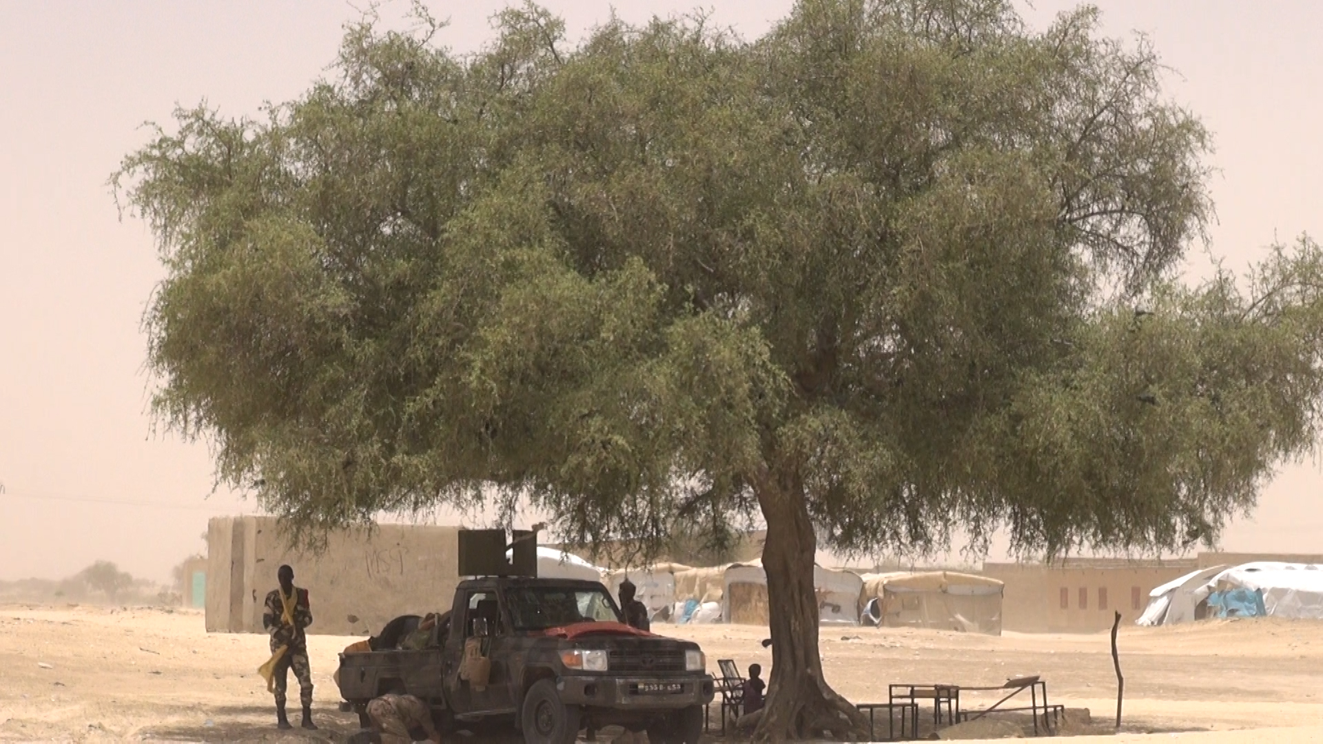 Un véhicule de l'armée nigérienne devant l'école de Bosso dans la région de Diffa, Niger, le 19 avril 2017 (VOA/Nicolas Pinault)